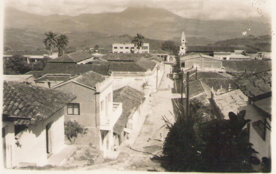 vista desde el barrio guadalupe